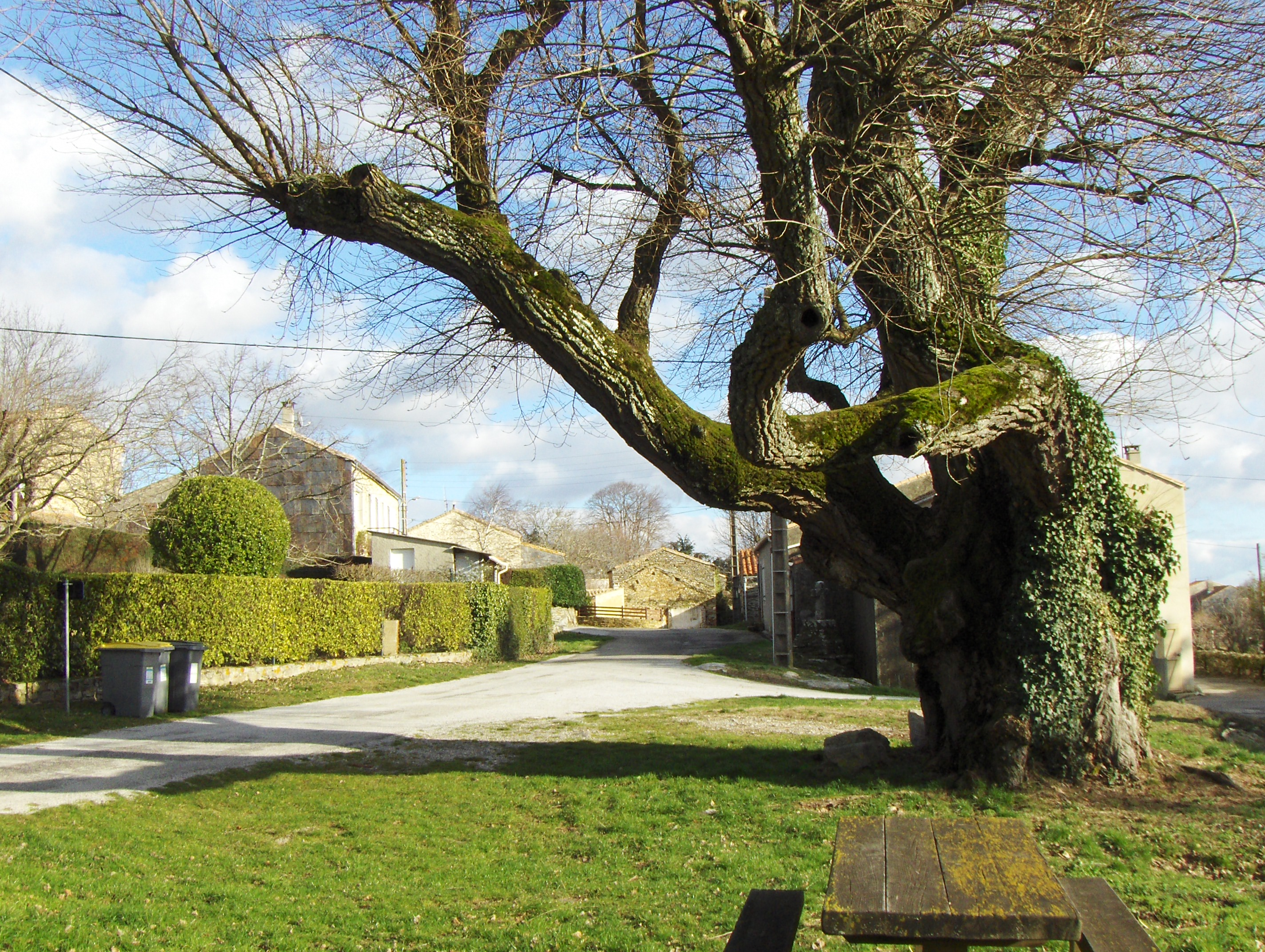 Le_Villaret2.JPG